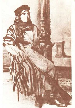 צבי הירשפלד